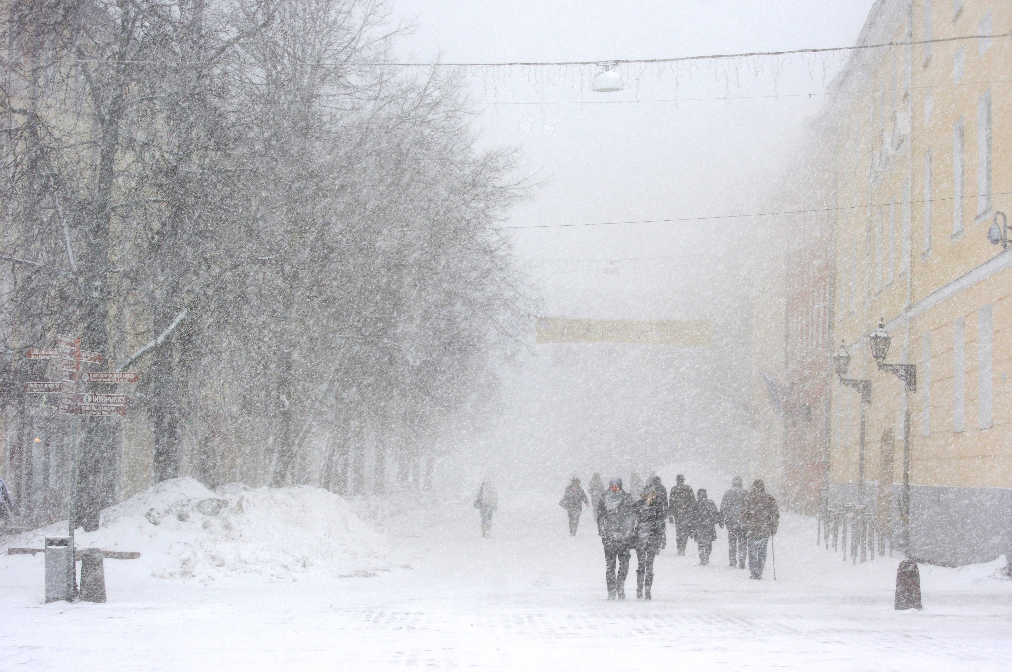 Ootamatu lumesadu Tartus 25. märtsil 2011